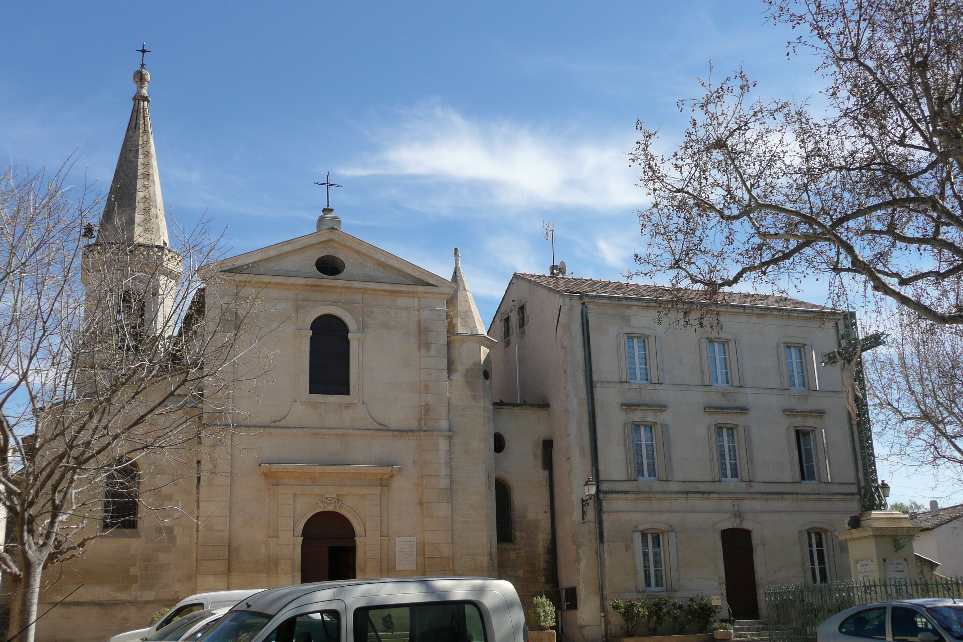 Eglise à Maillane.